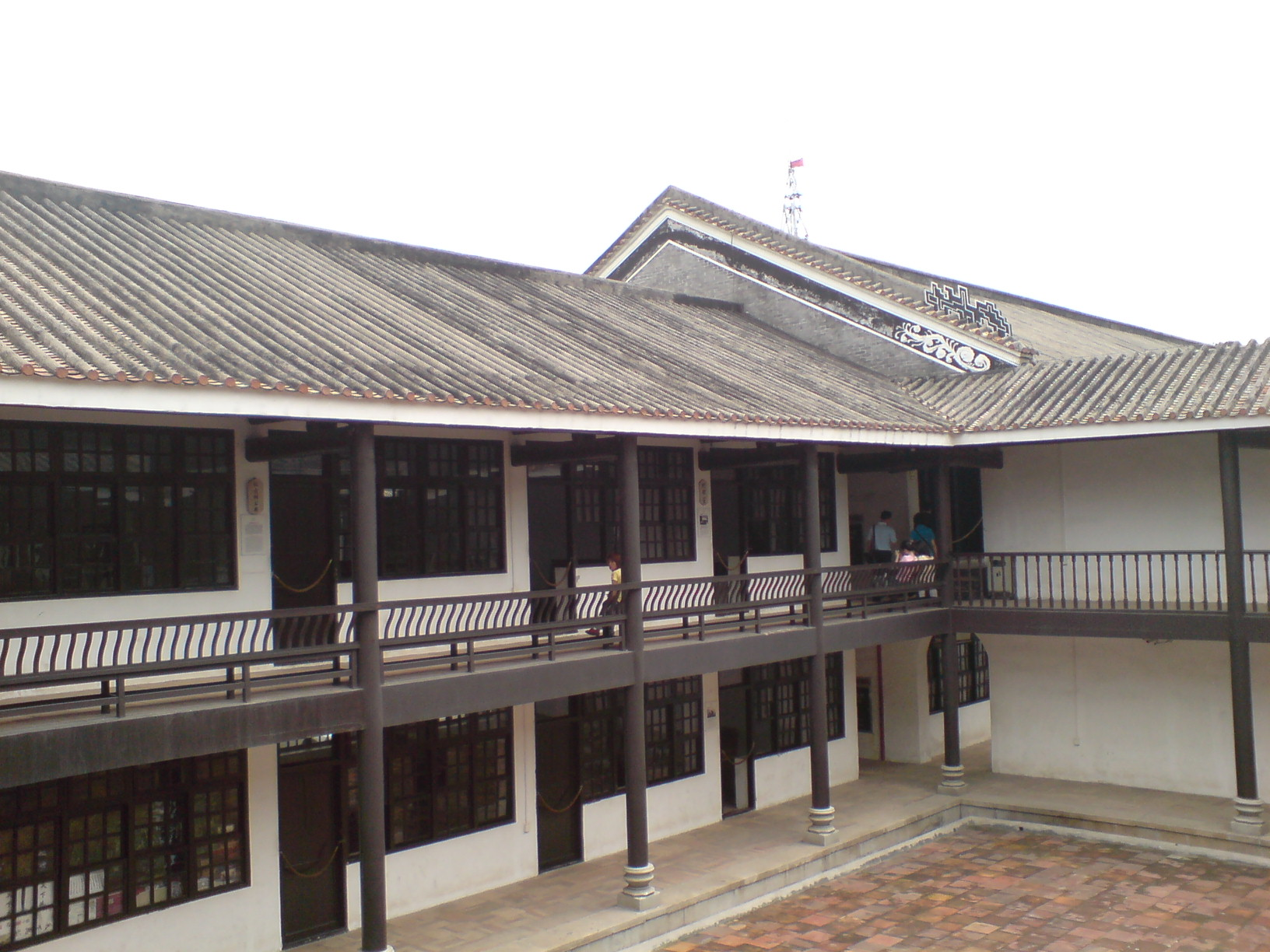 广州黄埔军校一角